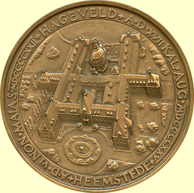 1925. Heemstede. Inwijding kapel nieuwgebouwde Klein Seminarie Hageveld. Vz. borstbeeld van Aug. Jos. Callier. Kz. gezicht in vogelvlucht op het seminarie. Brons 80 mm. Vervaardigd bij de Stichtsche Fabriek van Zilverwerken, Utrecht